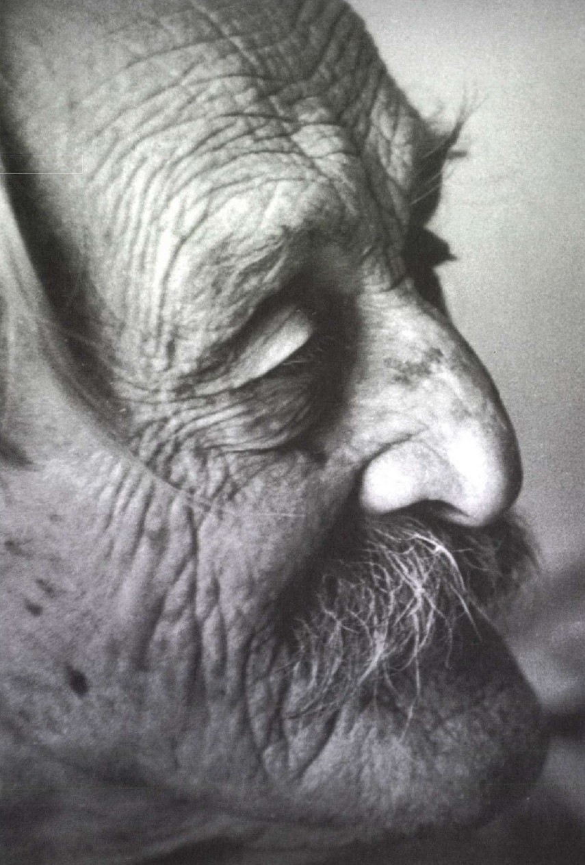 Kós Károly, eredeti nevén Kosch Károly (Temesvár, 1883. december 16. – Kolozsvár, 1977. augusztus 24.) magyar építész, író, grafikus, könyvtervező, szerkesztő, könyvkiadó, tanár, politikus.